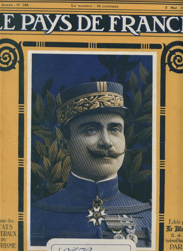 Paul Henrys, était un militaire français de la Première Guerre mondiale. Ici il est présenté en couverture de Le Pays de France n°185.